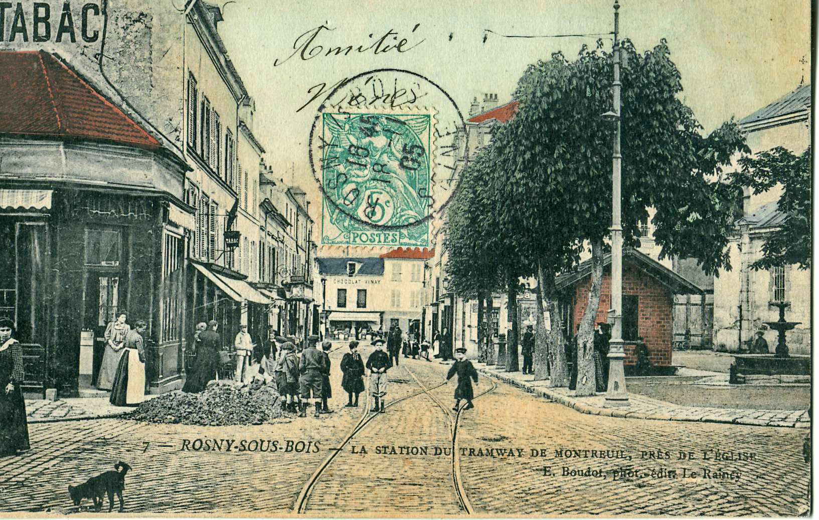 Carte postale ancienne éditée par Boudot au Raincy, N° 7